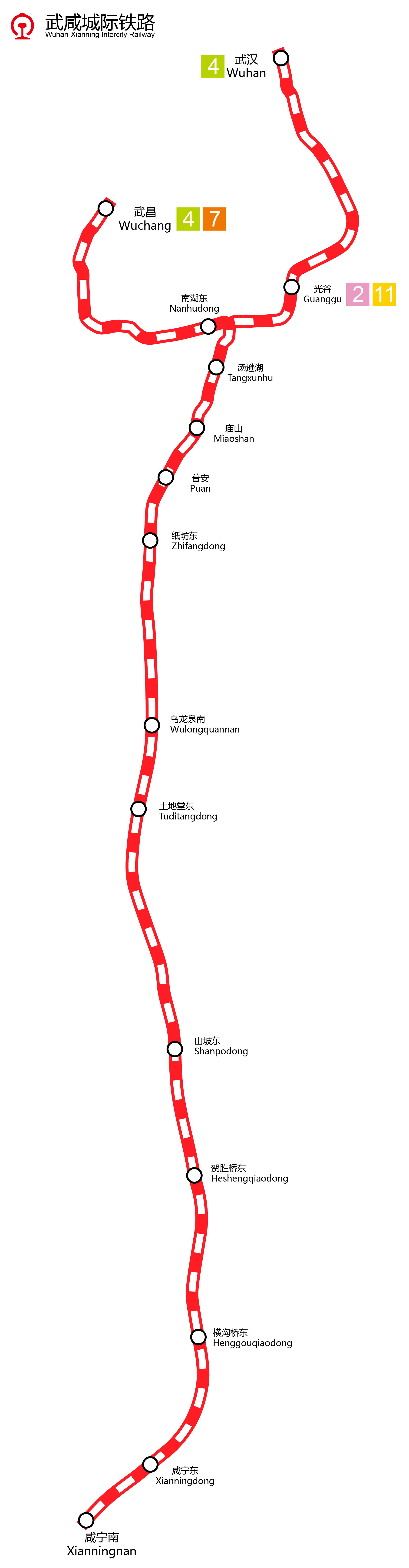 中文（中国大陆）: 武咸城际铁路路线图